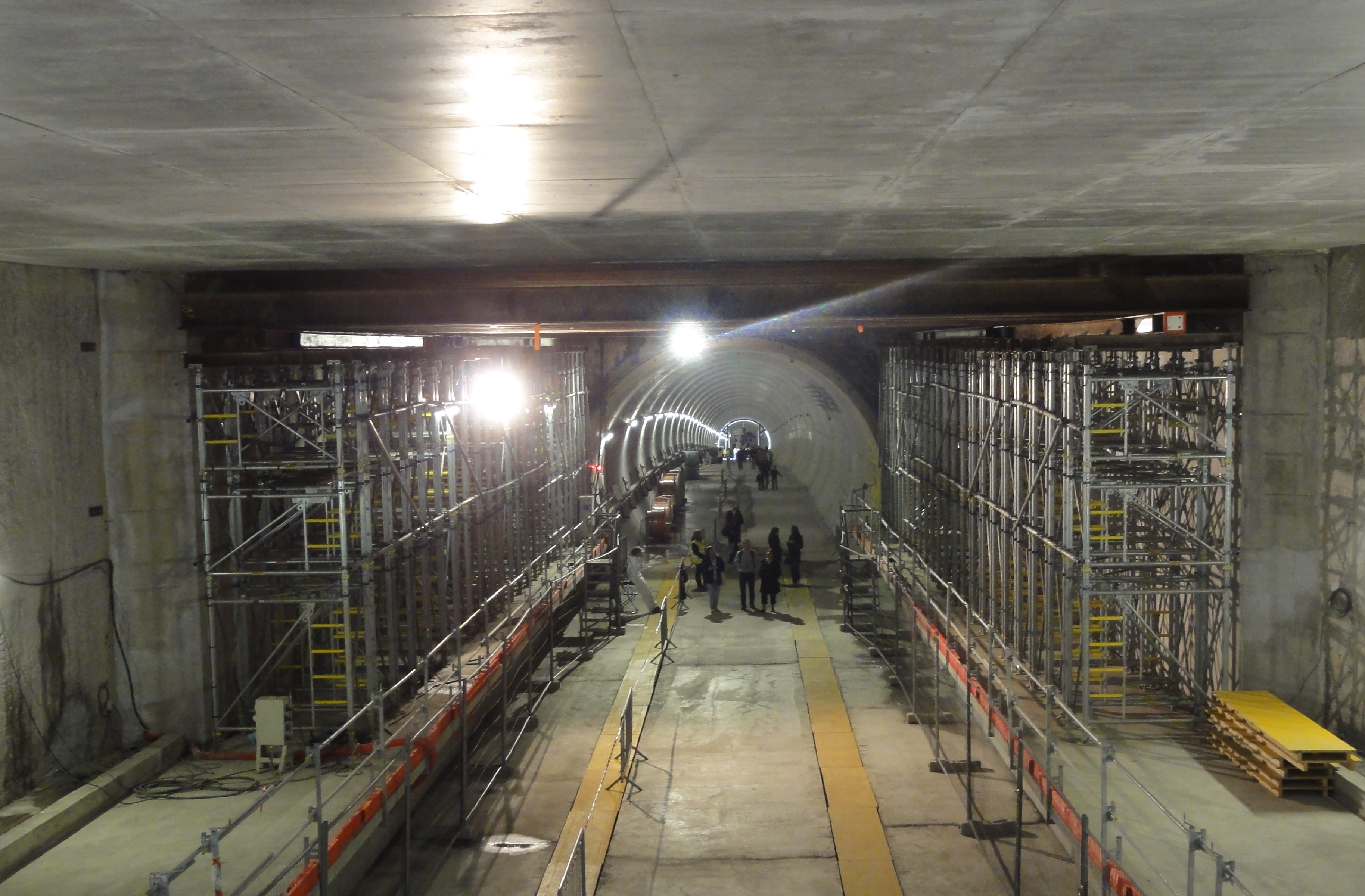 Station fantôme Plaine des Jeux en construction lors de la marche sous le Rhône le 7,8, 9 octobre 2011 organisé par le Sytral